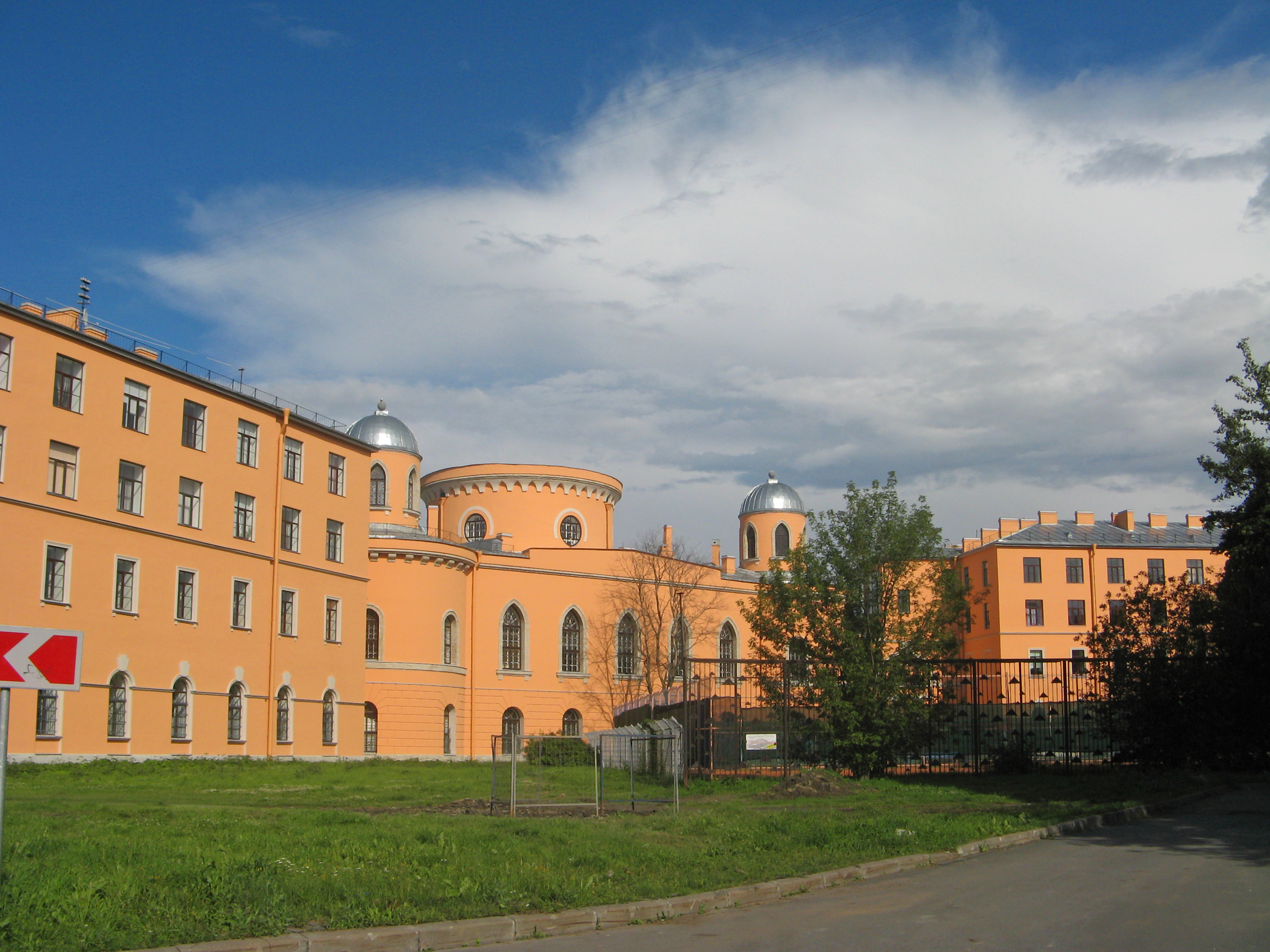 Чесменский дворец с флигелями: улица Гастелло, 15, Московский район, Санкт-Петербург